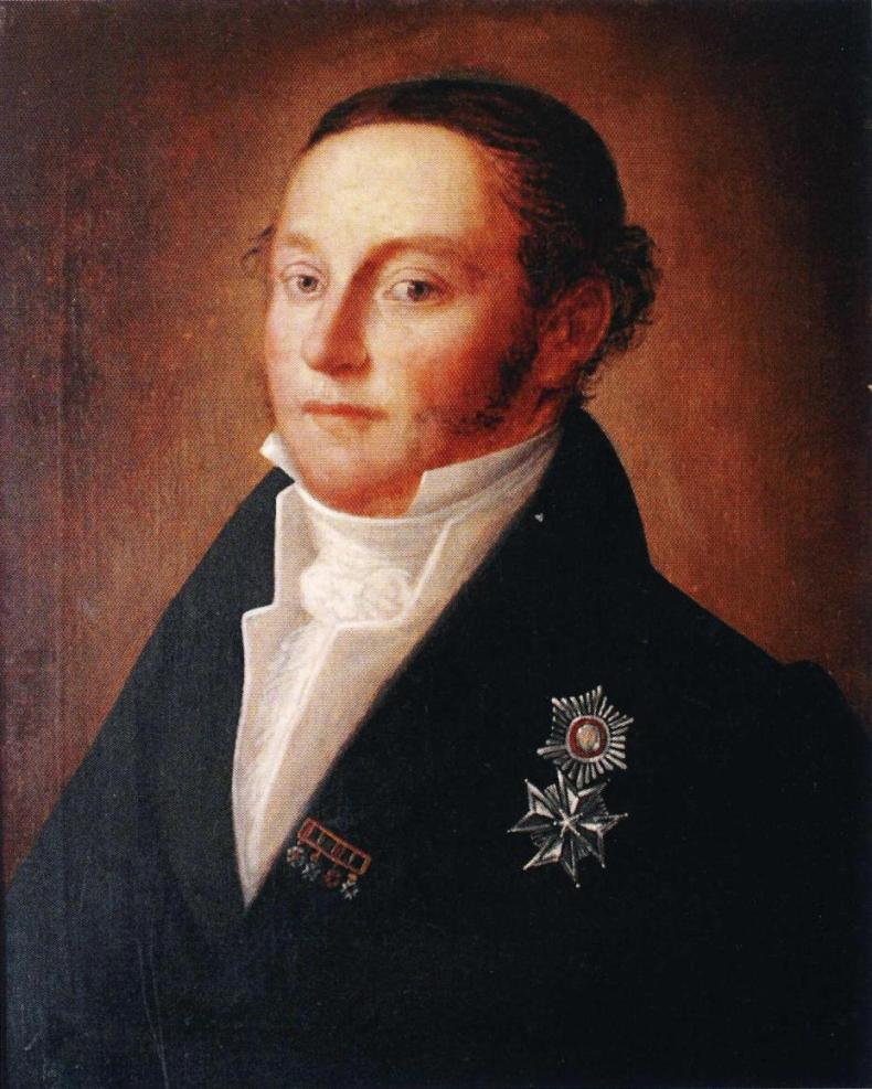 Senaattori ja maaherra Knut von Troil (1760–1825). Muotokuva yksityisomistuksessa.